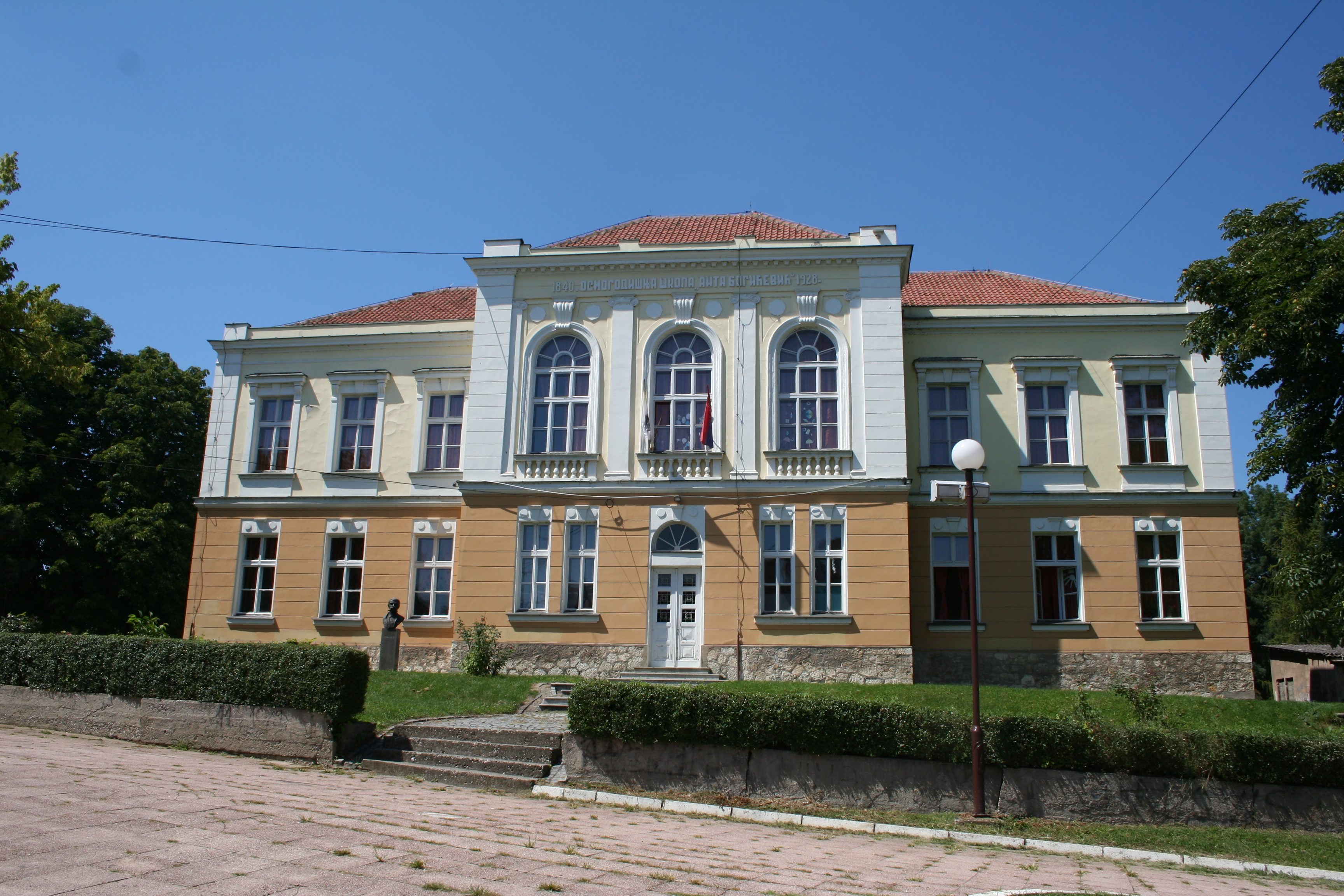 OŠ "Anta Bogićević" Loznica